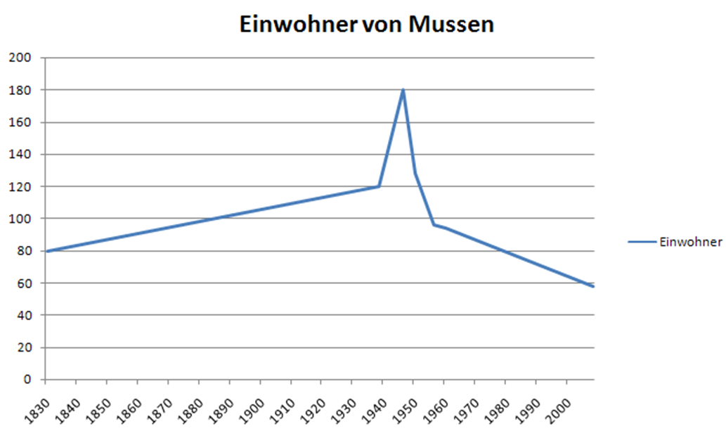 Einwohnerentwicklung des Ortes Mussen